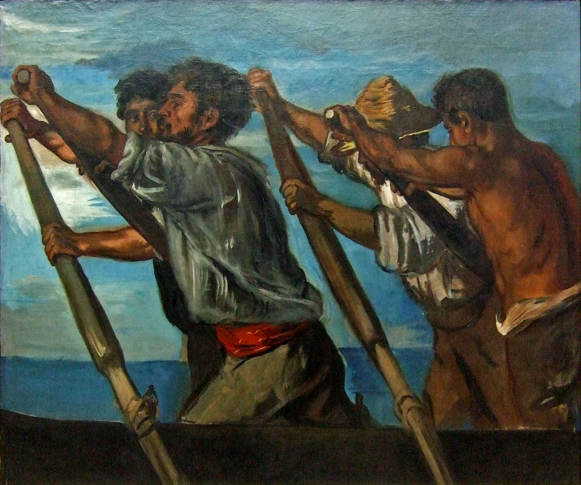 Alte Nationalgalerie, Berlin.